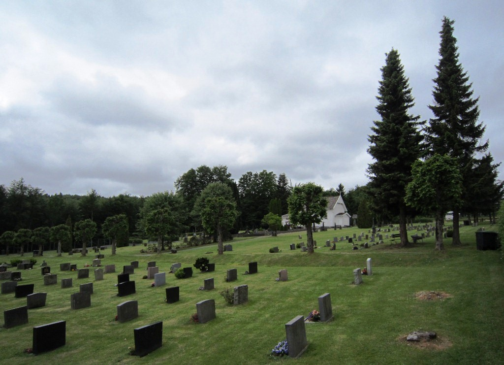 Langestrand øvre kirkegård med Langestrand kapell